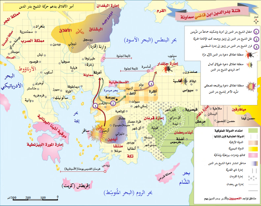 خريطة آسيا الصُغرى والروملِّي زمن السُلطان مُحمَّد الأوَّل، تُظهر مناطق حركة الشيخ بدر الدين السماوني.